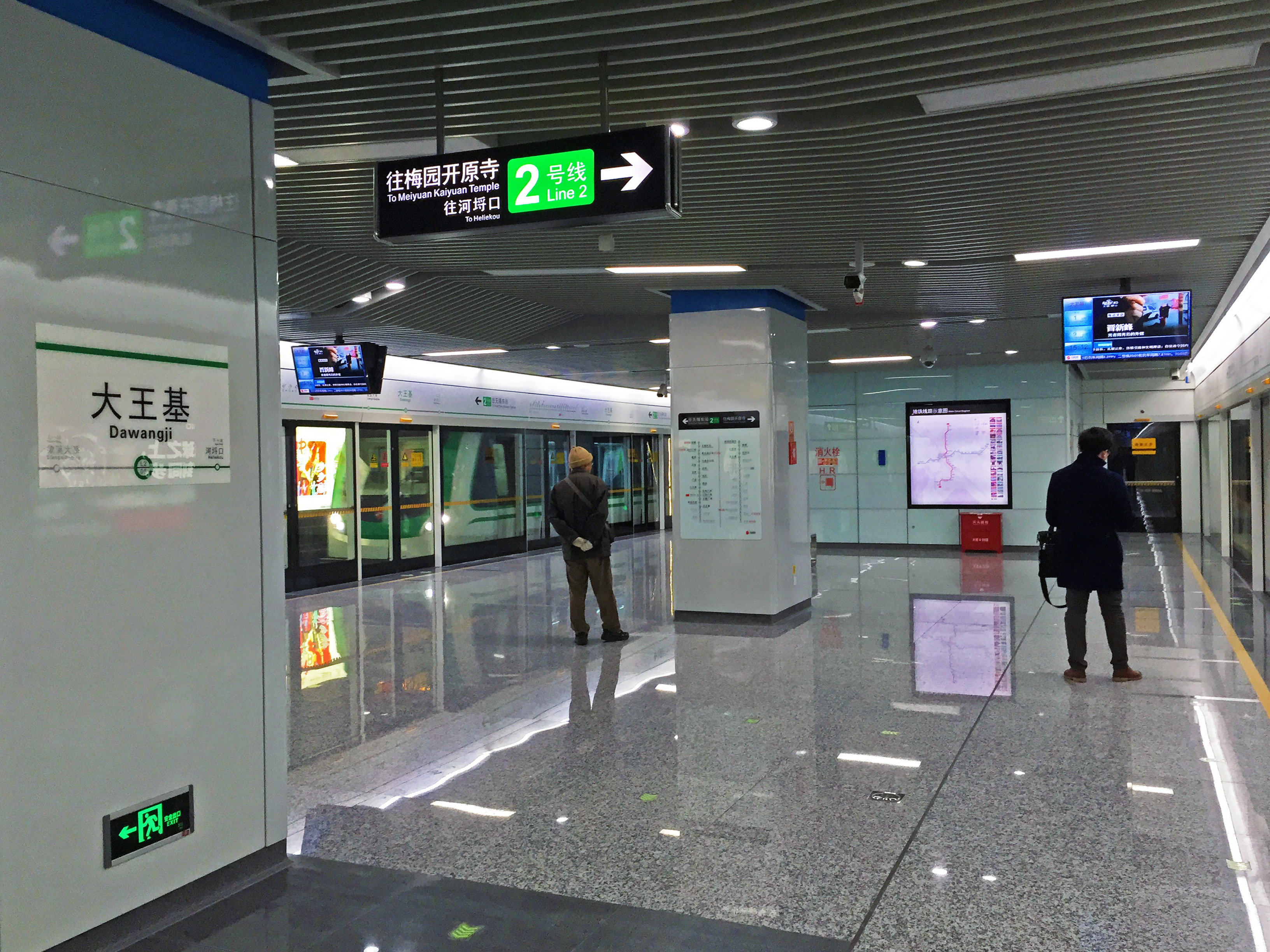 無錫地鐵2號線大王基站月臺